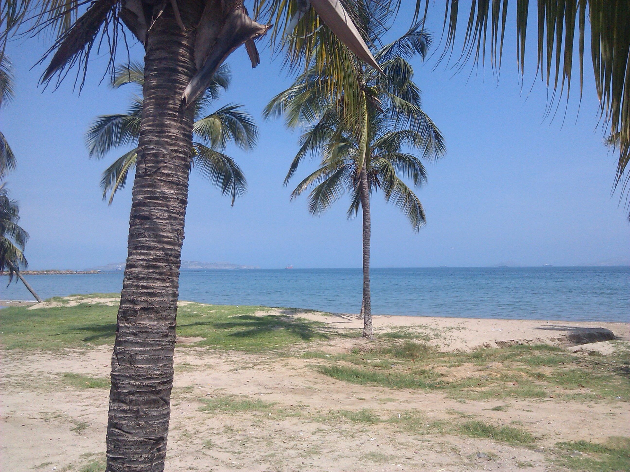 Playa en el Paseo Colon de Puerto La Cruz en Venezuela.